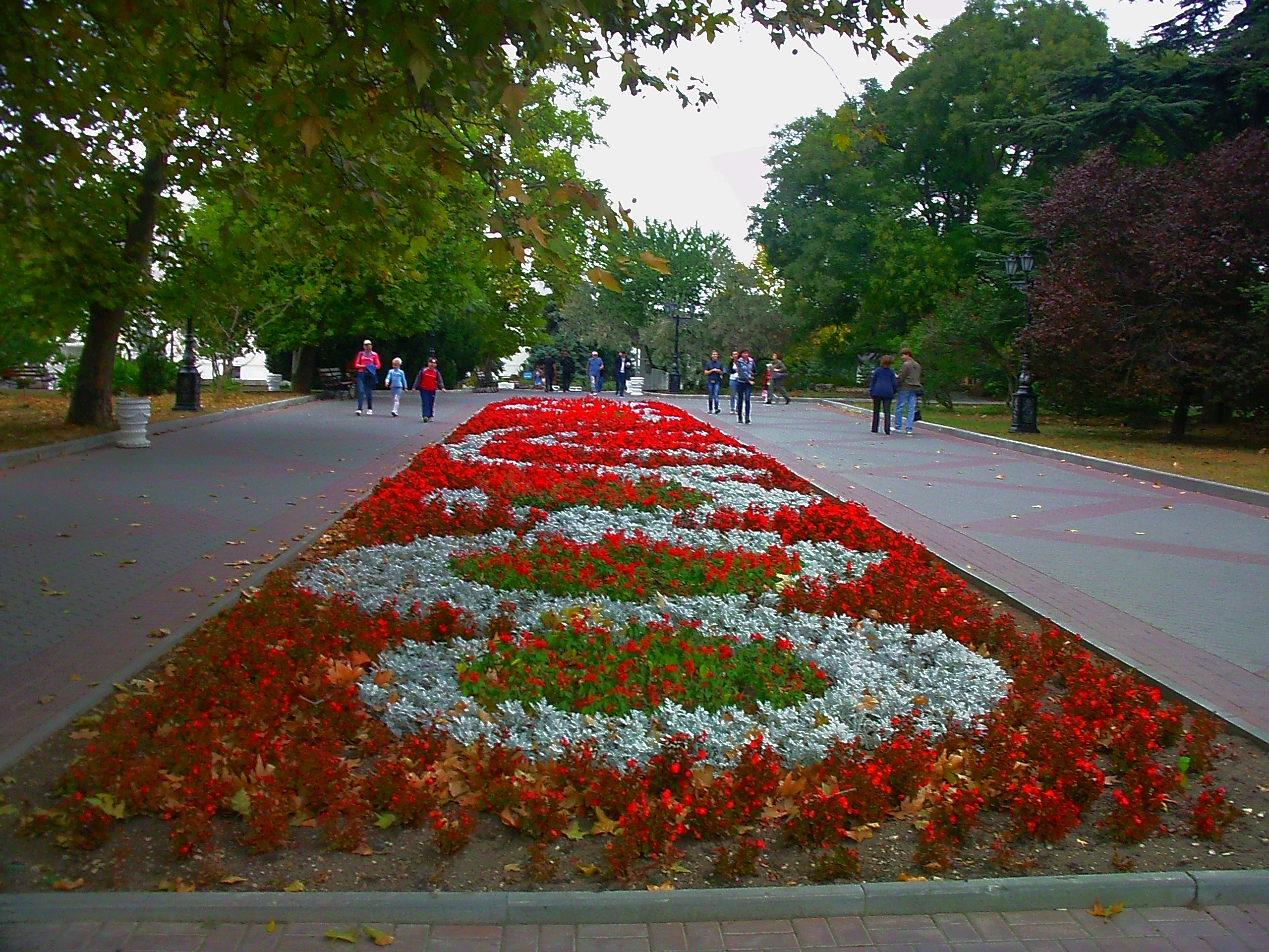 цветочная клумба